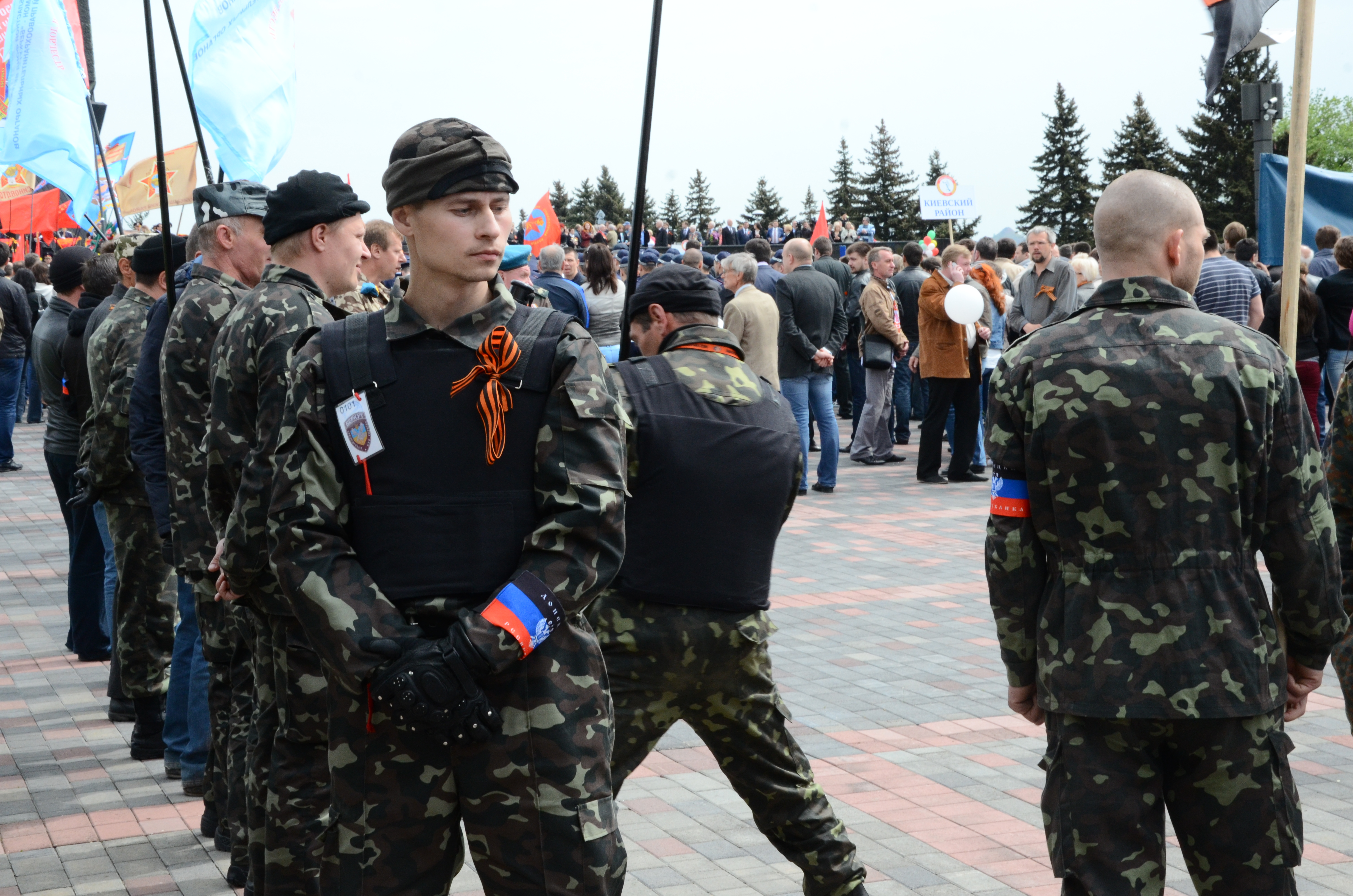 День Победы в Донецке